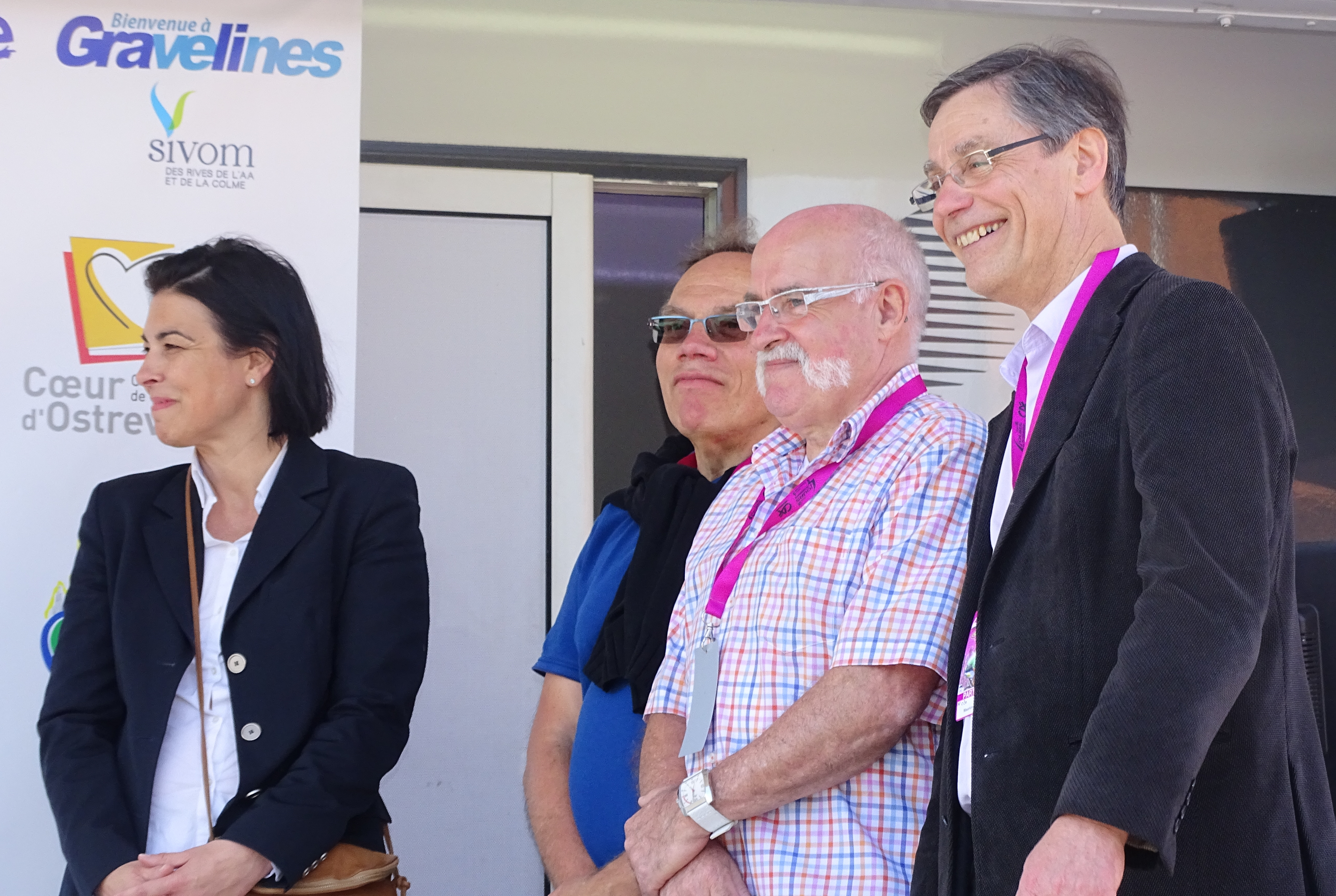 Reportage réalisé le vendredi 6 mai 2016 à l'occasion de l'arrivée de la troisième étape des Quatre jours de Dunkerque 2016 à Saint-Pol-sur-Ternoise, Pas-de-Calais, Nord-Pas-de-Calais, France. Depicted place: Saint-Pol-sur-Ternoise Depicted person: Maurice Louf – French politician